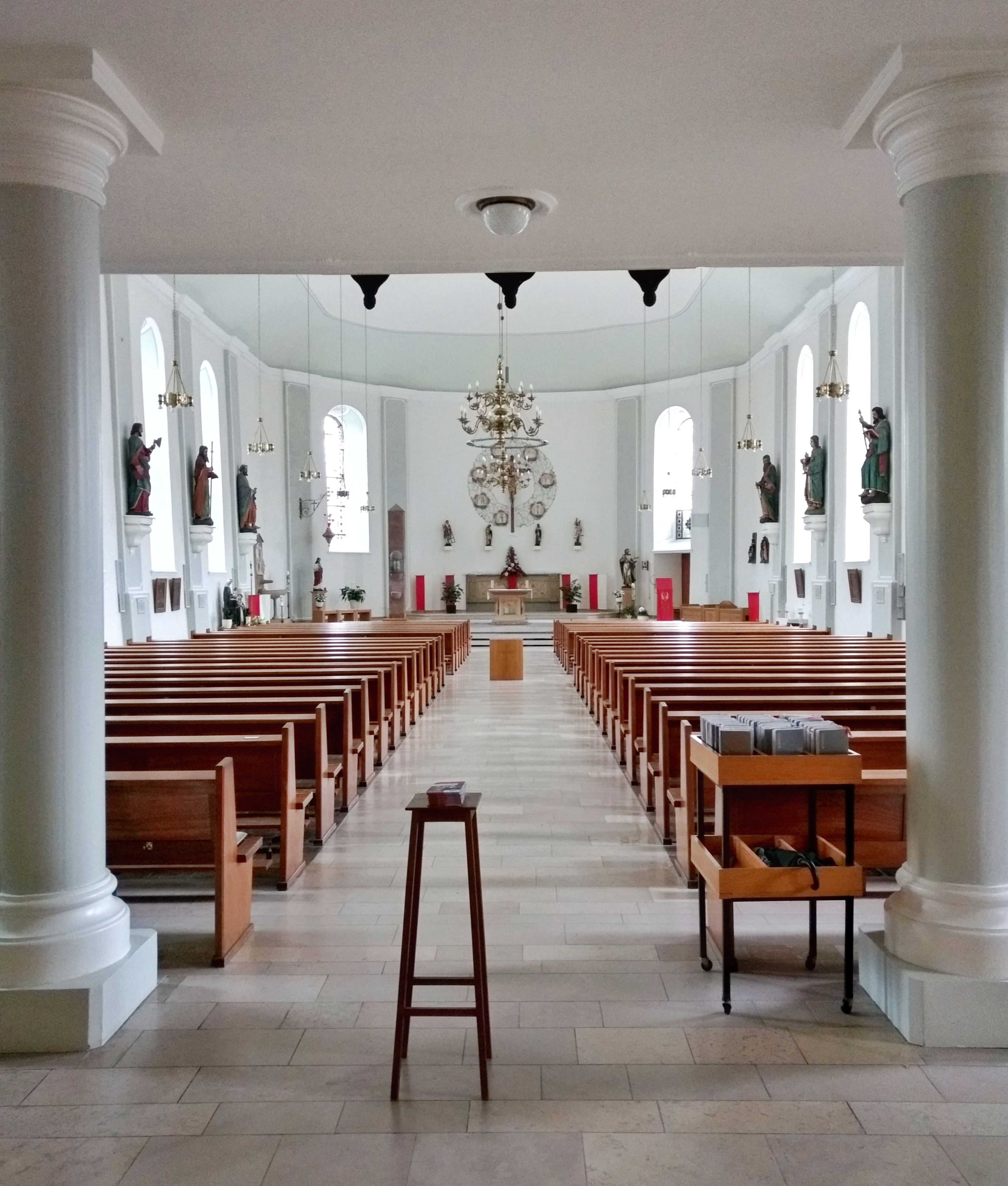 Allerheiligen Kirche Wadern